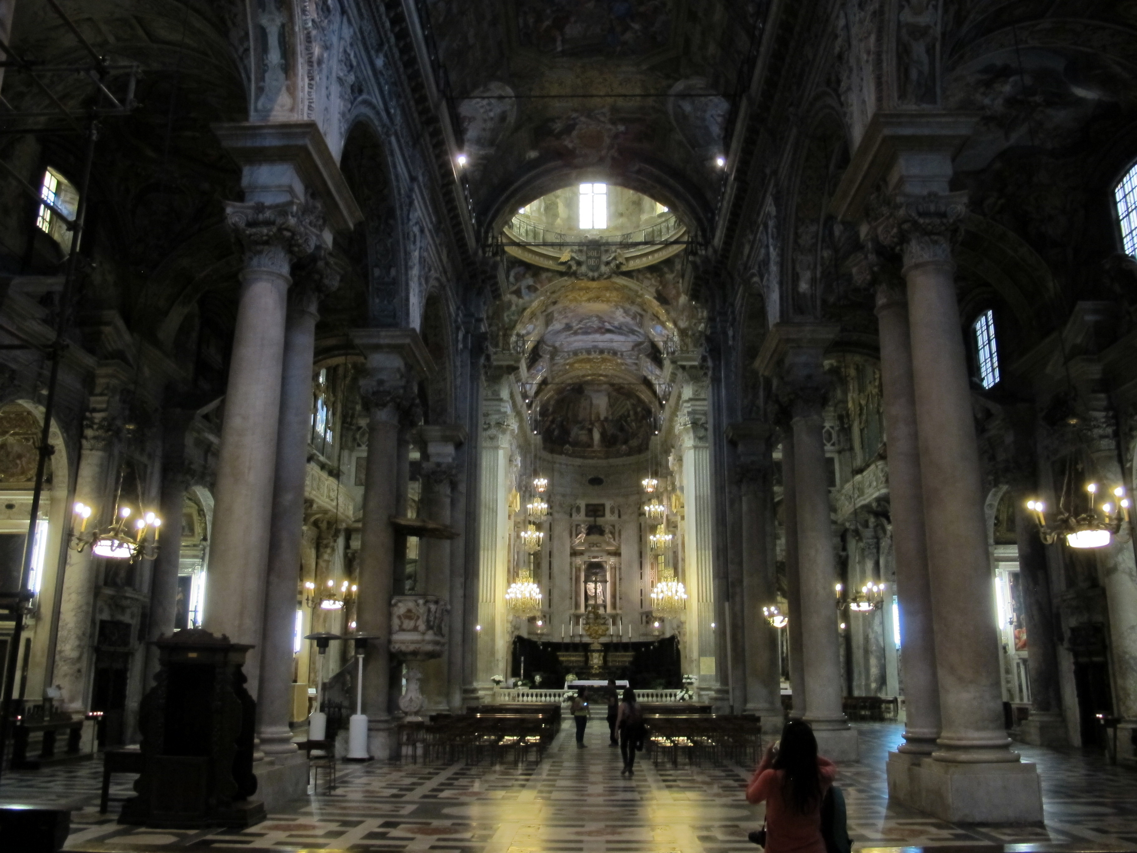 San Siro (Genova)